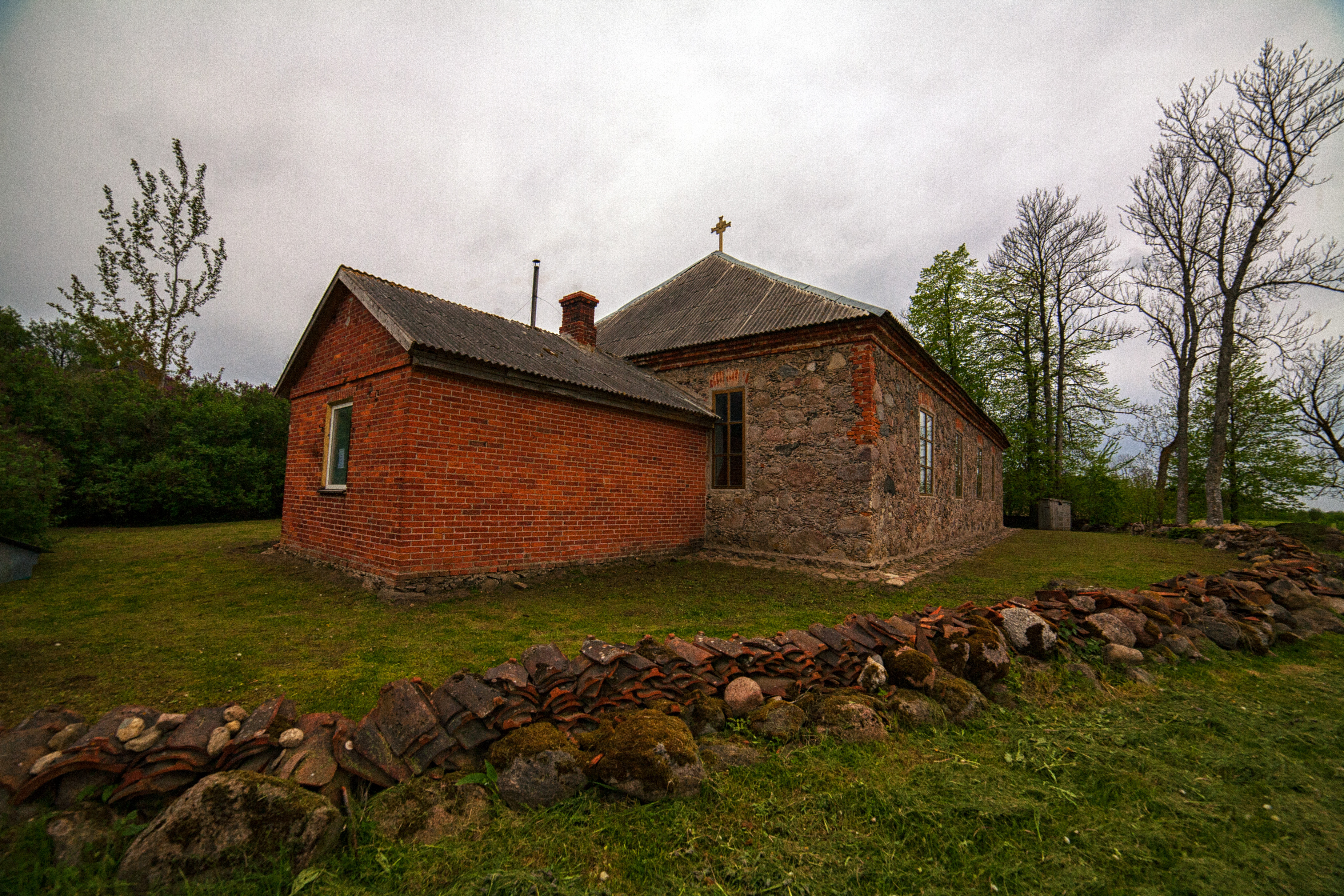 Saraiķu luterāņu baznīca